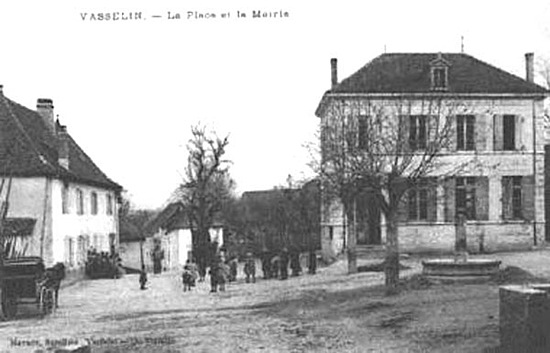 La mairie et la place de Vasselin, carte postale ancienne.